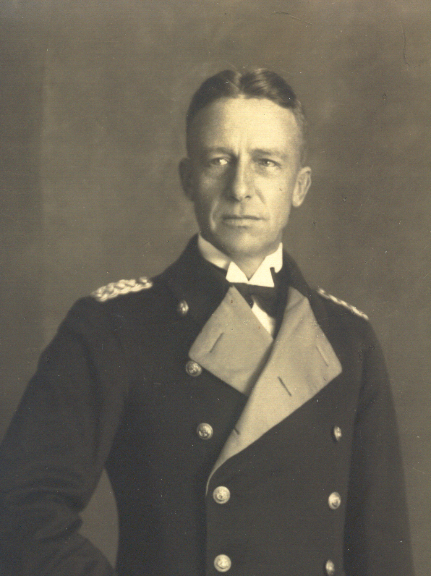 Porträtfotografie von Kapitän zur See Werner Tillessen